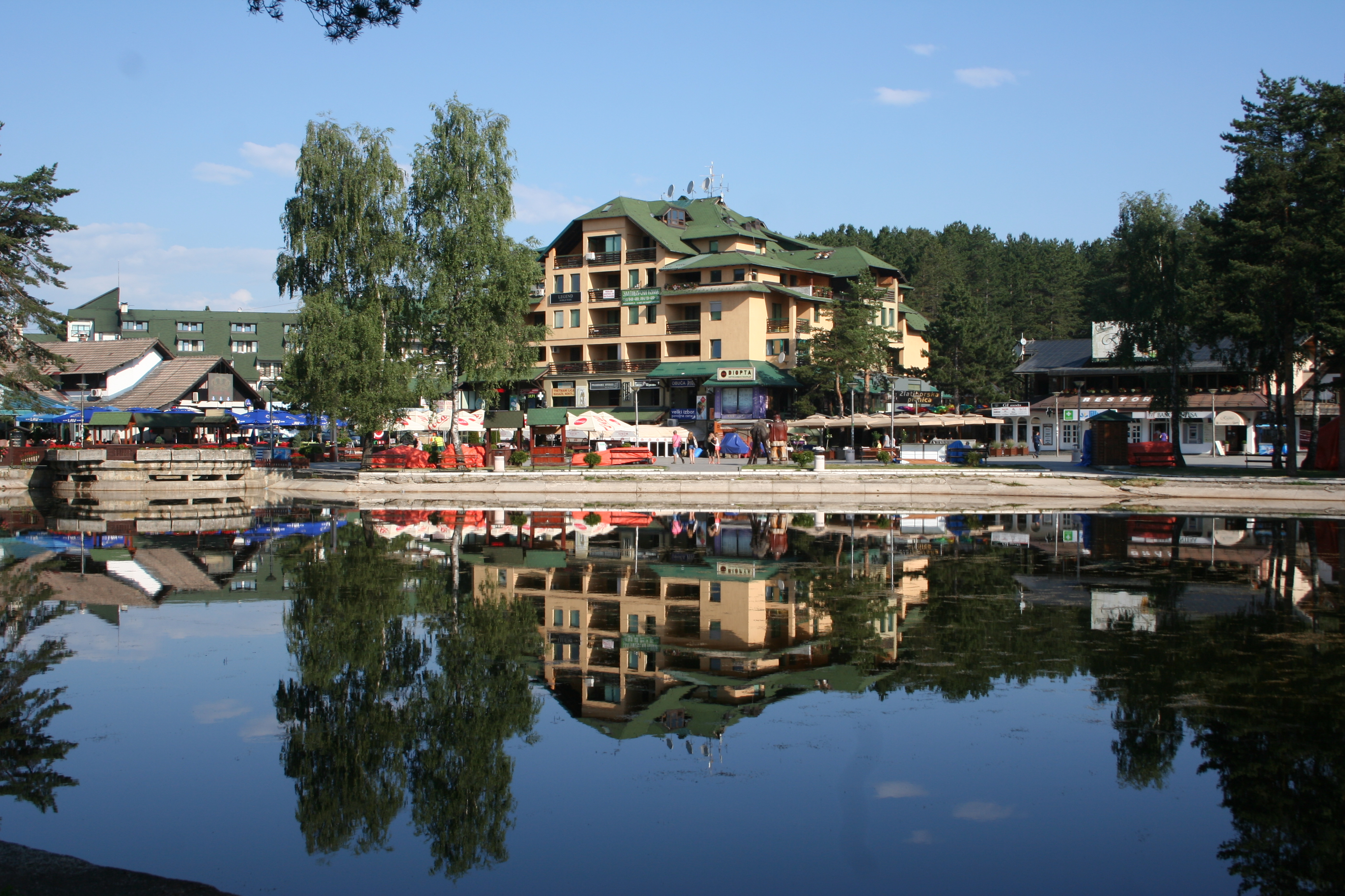 Zlatibor